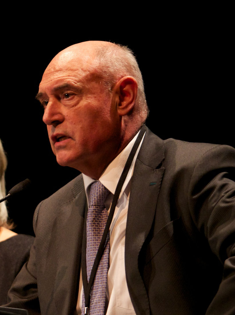 Debat 'Burgerschap in een globaliserende wereld' met drs. Andrée van Es, prof. dr. Paul Scheffer, prof. dr. Herman Wijffels @ 40 jaar NCDO